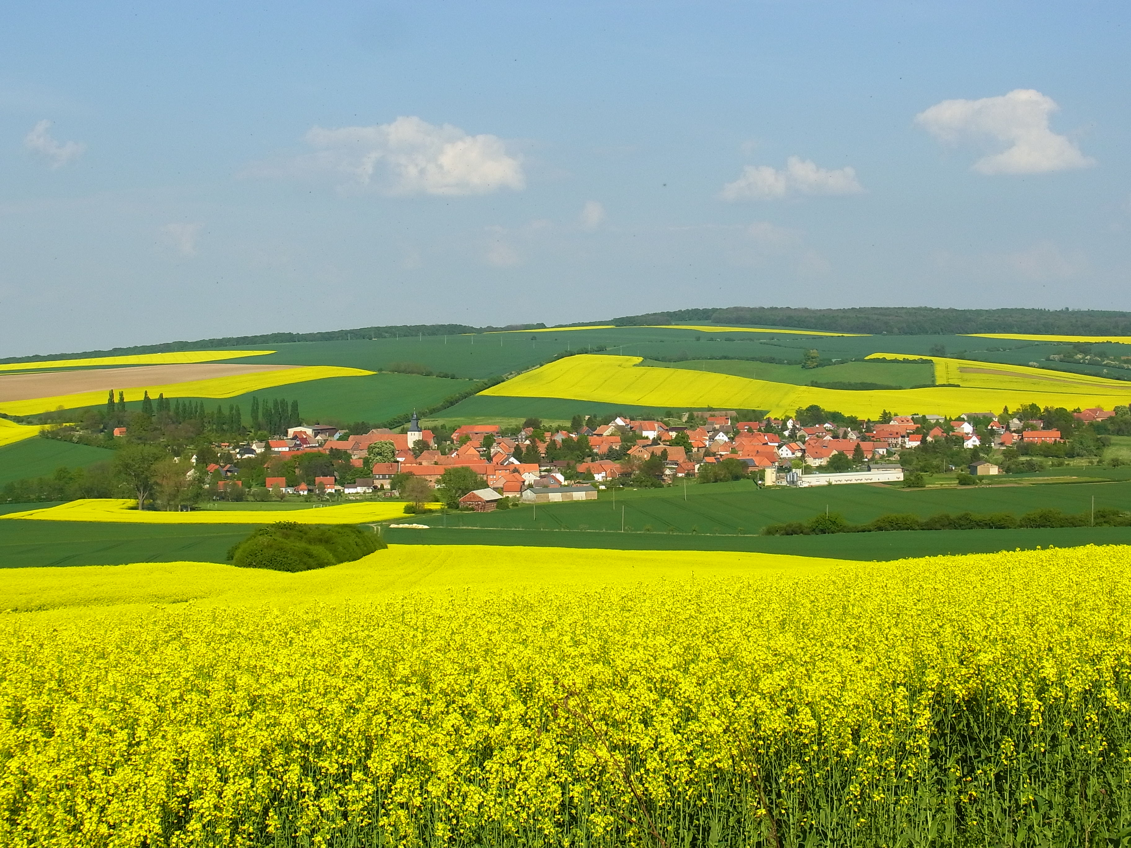 Dies ist ein Foto von Rhoden (Ortsteil von Osterwieck). Fotografiert vom ehemaligen Wachturm Rhoden auf dem Kleinen Fallstein.